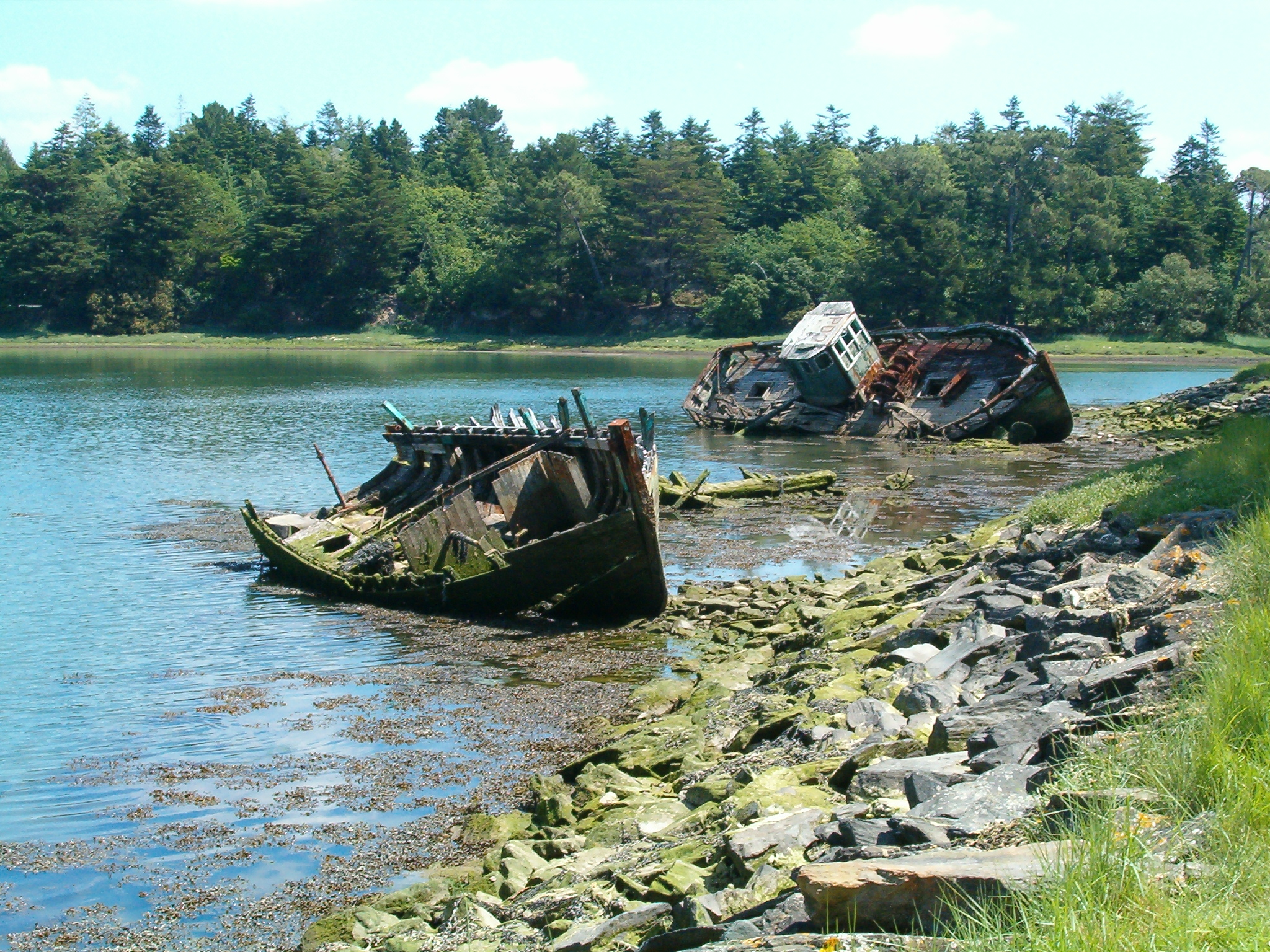 Épaves dans l'anse de Penfoul (anse annexe de l'Odet) à Bénodet.